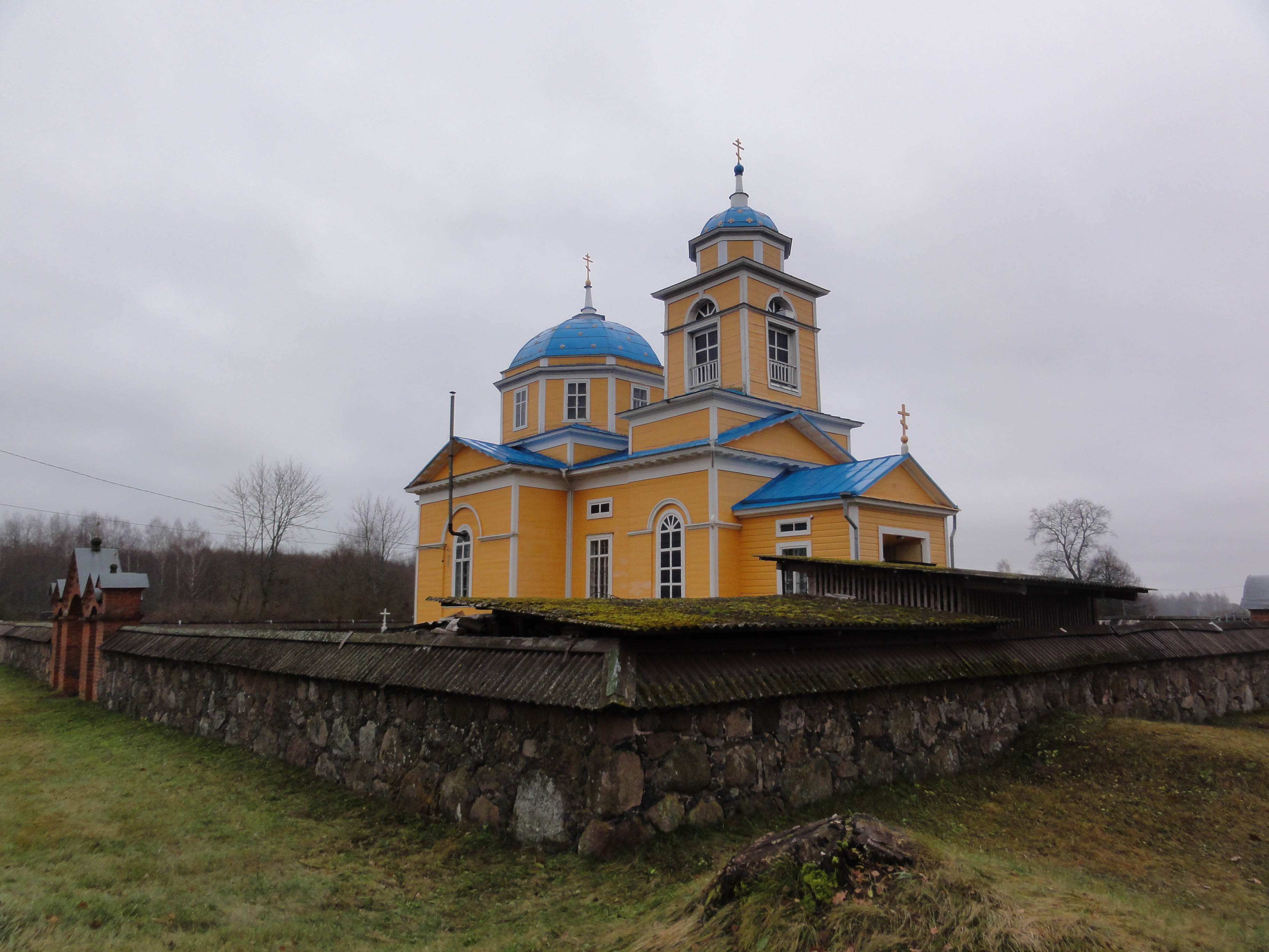 Церковь в Голышеве